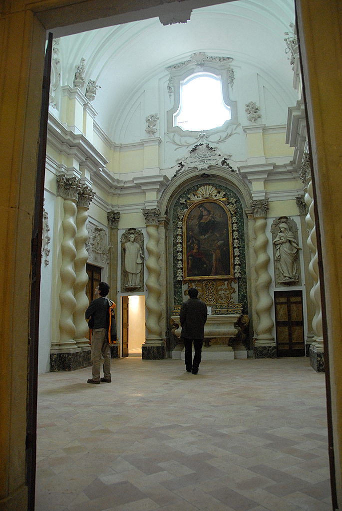 Cappella posta all'interno del Palazzo Comunale